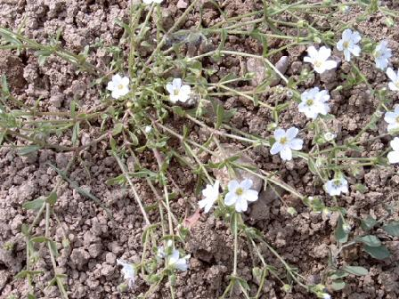 Sabline d'espagne, photo P40p